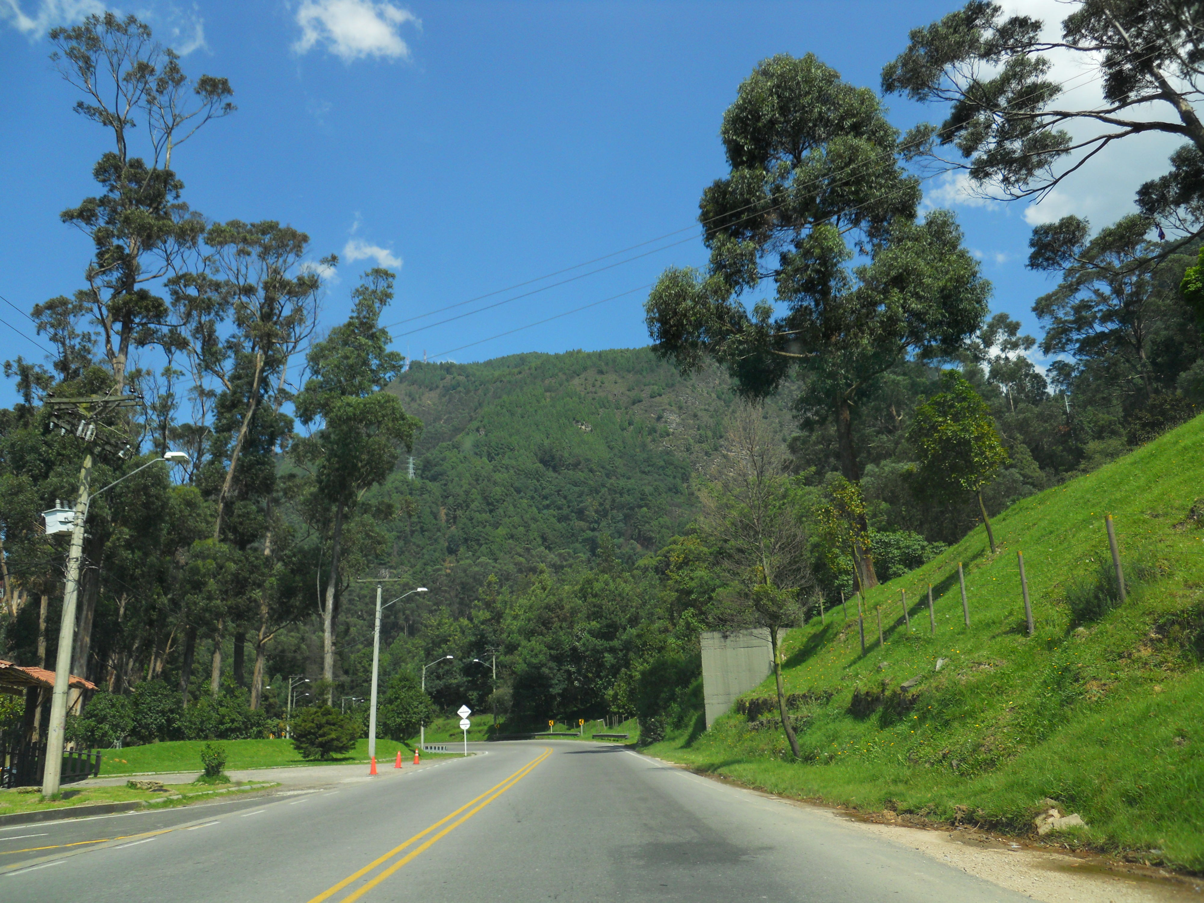 Bogotá, avenida Circunvalar a la altura del Parque Nacional. Al fondo, cerro del Cable.